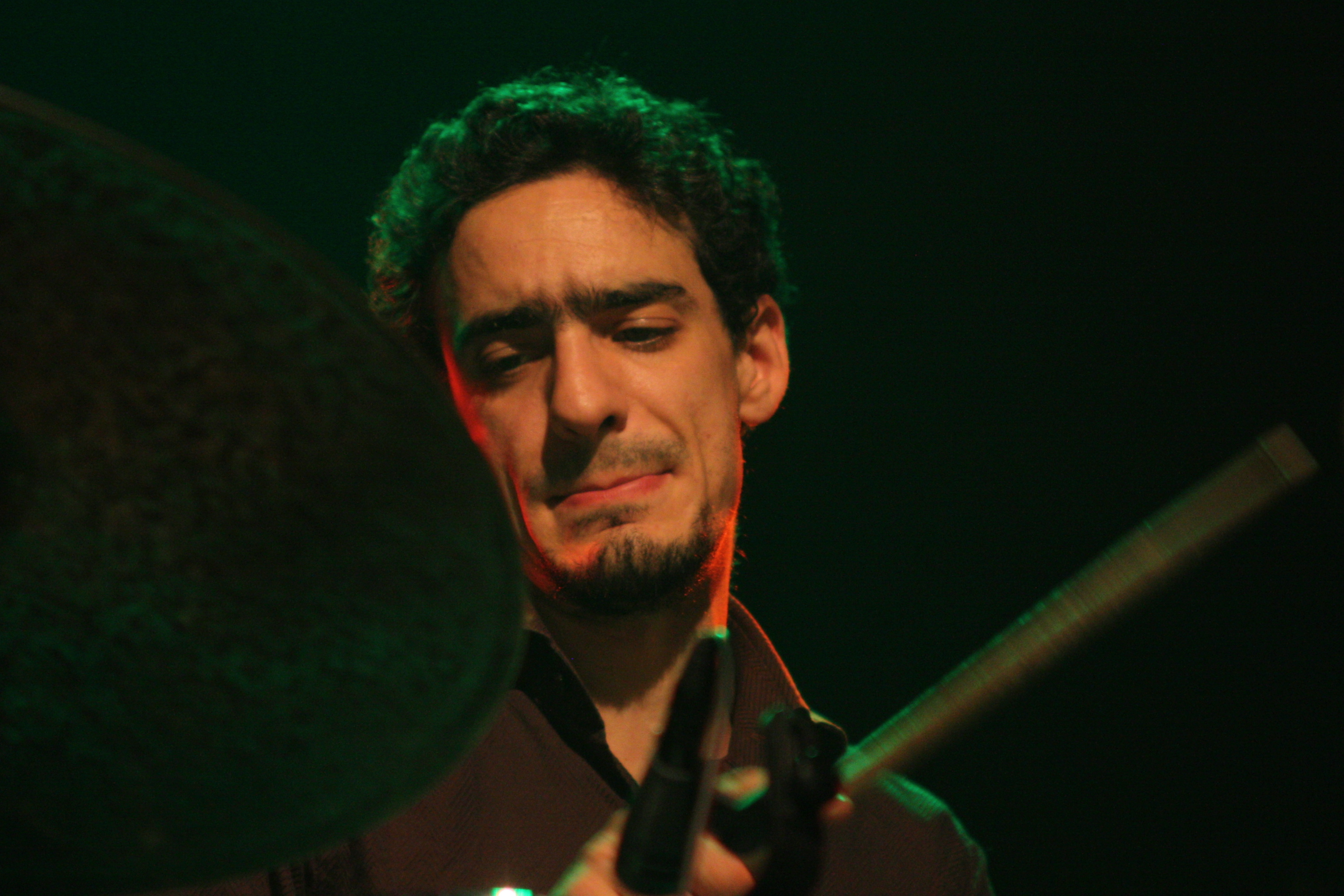 44. Deutsches Jazzfestival Frankfurt 2013: Yoann Serra von Guillaume Perret & The Electric Epic